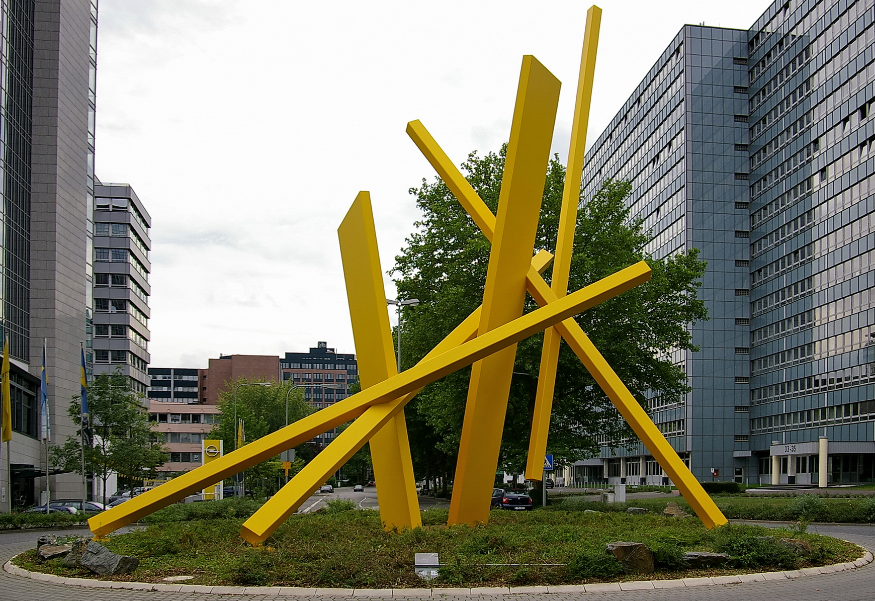 Skulptur in Eschborn im Gewerbegebiet Süd auf dem Kreisverkehr zwischen Frankfurter Straße, Alfred Herrhausen Allee und Mergenthaler Allee. Die Skulptur ist Teil der Skulpturenachse Eschborn. Das Kunstwerk trägt den Namen Fulcrum und wurde von John Henry (*1943) geschaffen und 2002 installiert.